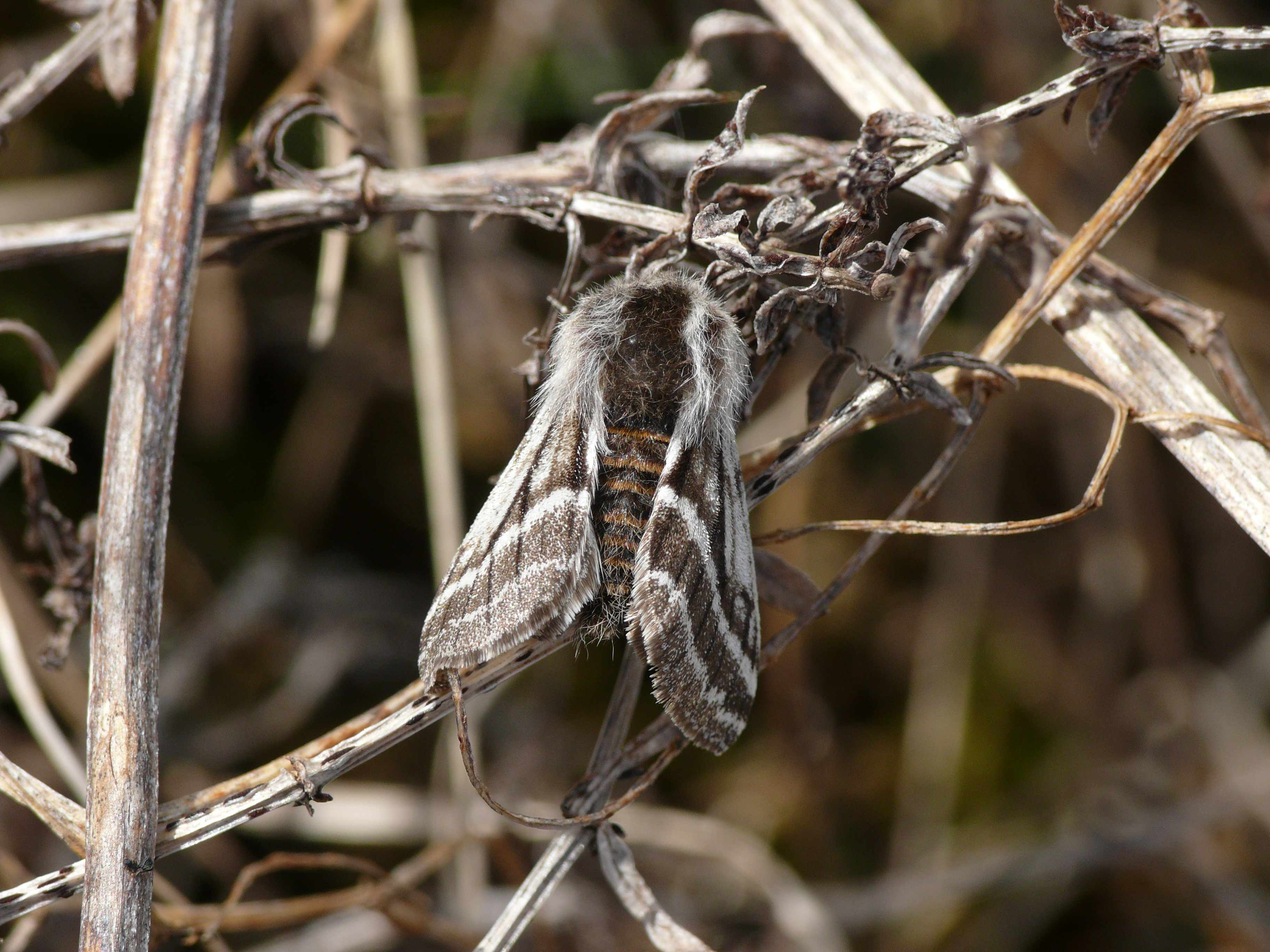 Männchen des Trockenrasen-Dickleibspanners (Lycia zonaria), Münchner Umland